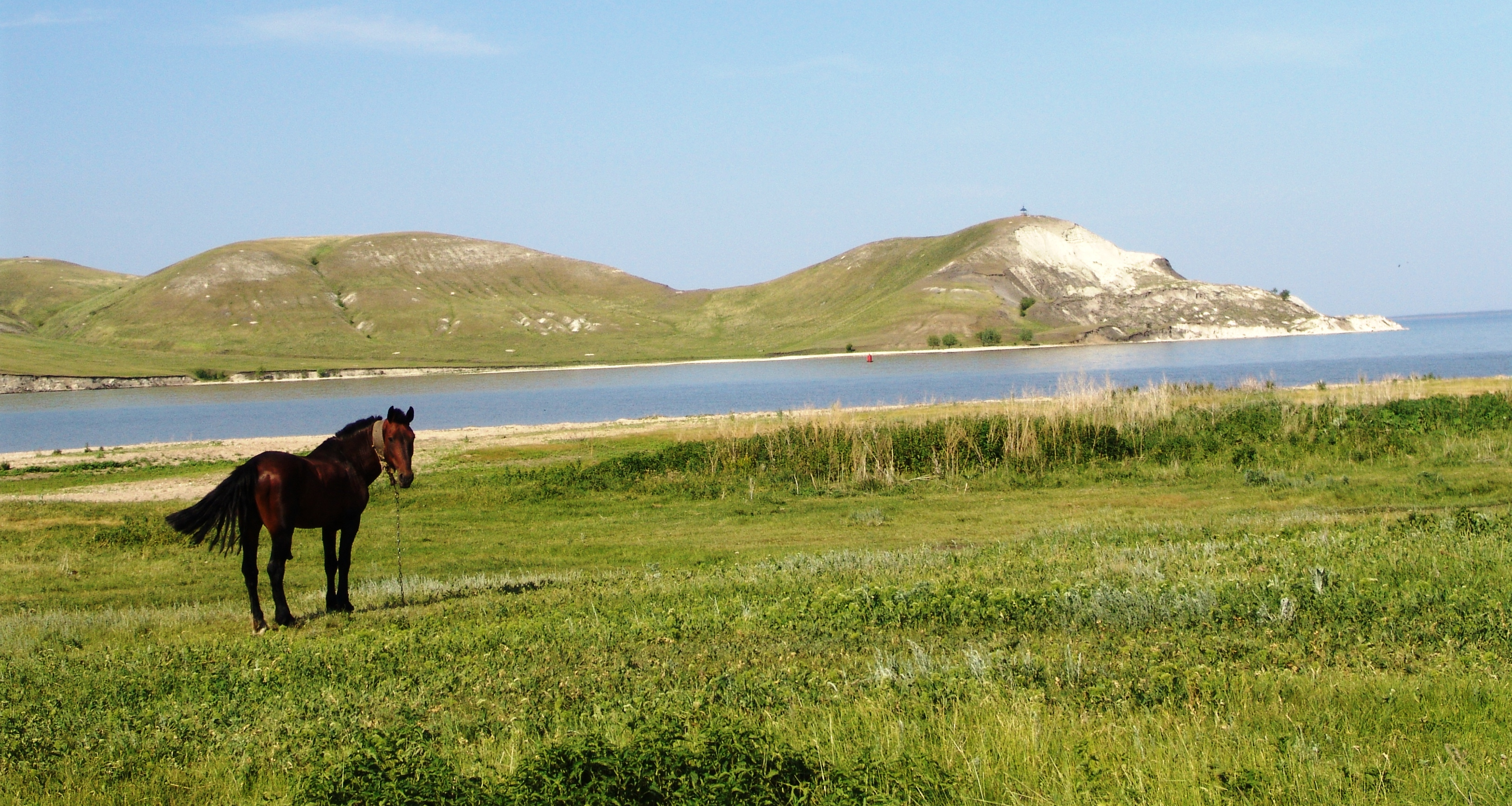 Село Подвалье Шигонского района Самарской области. Ильинские горы.